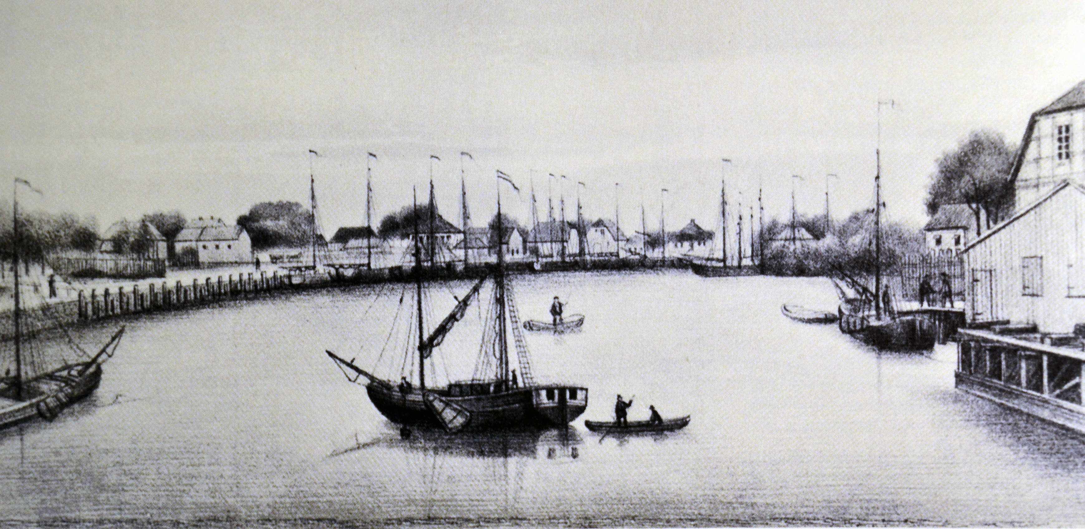 Abbildung des Bremervörder Hafens um das Jahr 1860.